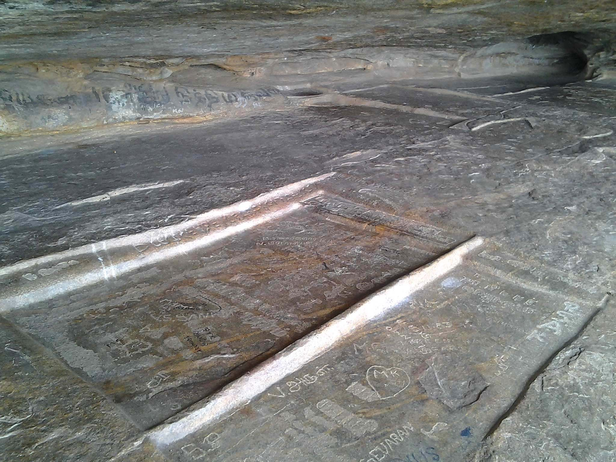 Samanar Padukkai in sittanavasal